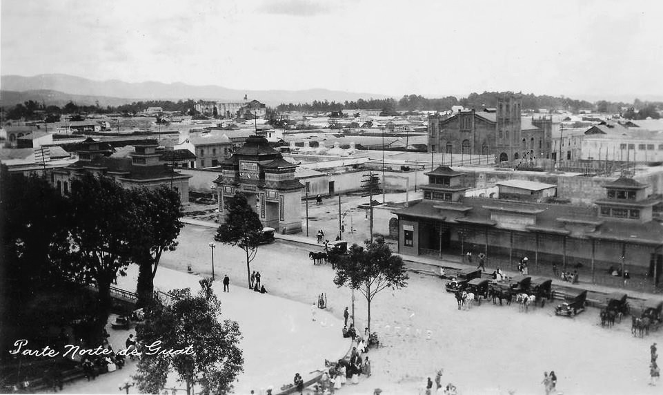 Plaza de armas en 1925.